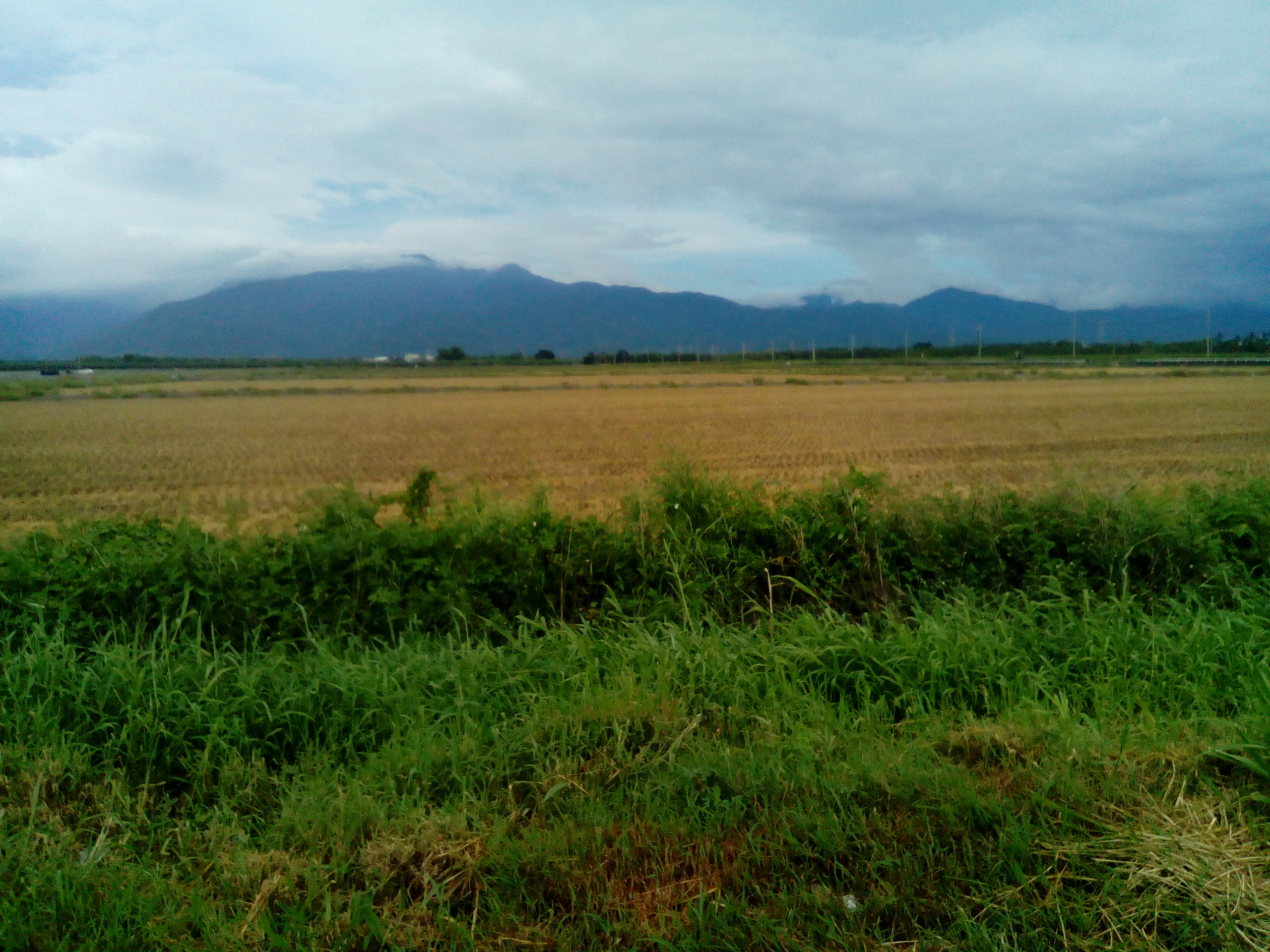 189縣道打鐵至光春段所攝